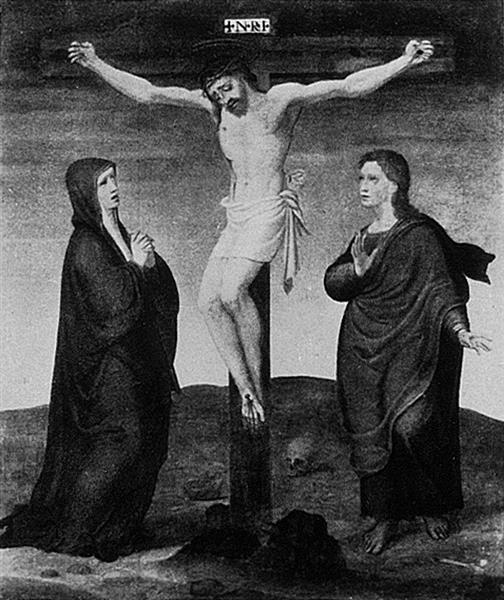 Juan Correa de Vivar, Kreuzigung, 86x73,5 cm, Öl auf Kiefernholz, um 1550/1560 (?), Gemäldegalerie Alte Meister Dresden, 1945 zerstört.